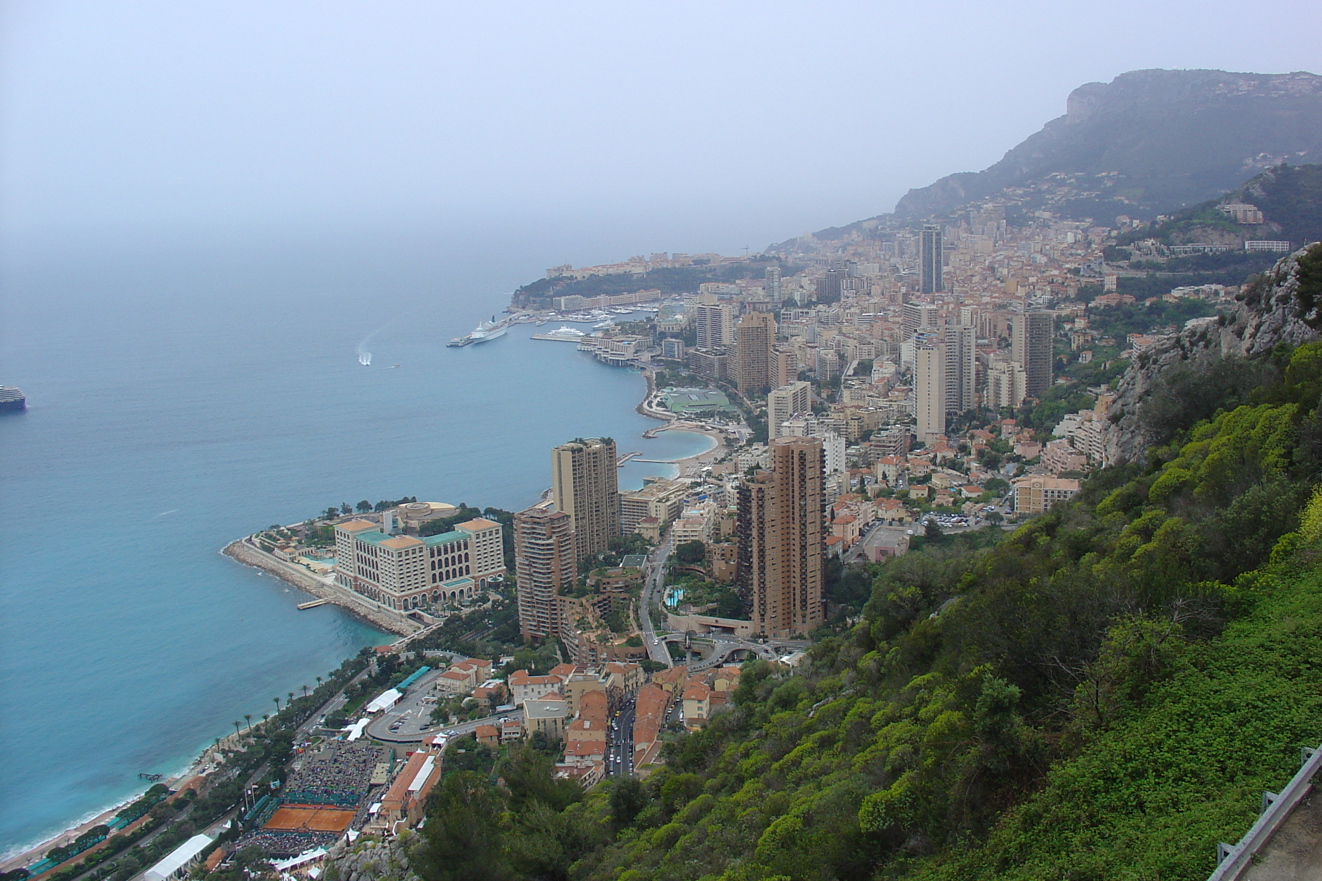 Widok na Monaco